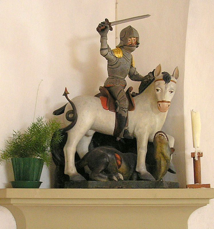 Kapelle St. Georg bei Peißenberg (Landkreis Weilheim-Schongau, Oberbayern). Sankt Georg (16. Jahrhundert) Eigene Aufnahme, August 2007 / St. George's chapel near Peissenberg (Upper Bavaria, Germany). St. George (16th century)). Own photo, Aug. 2007